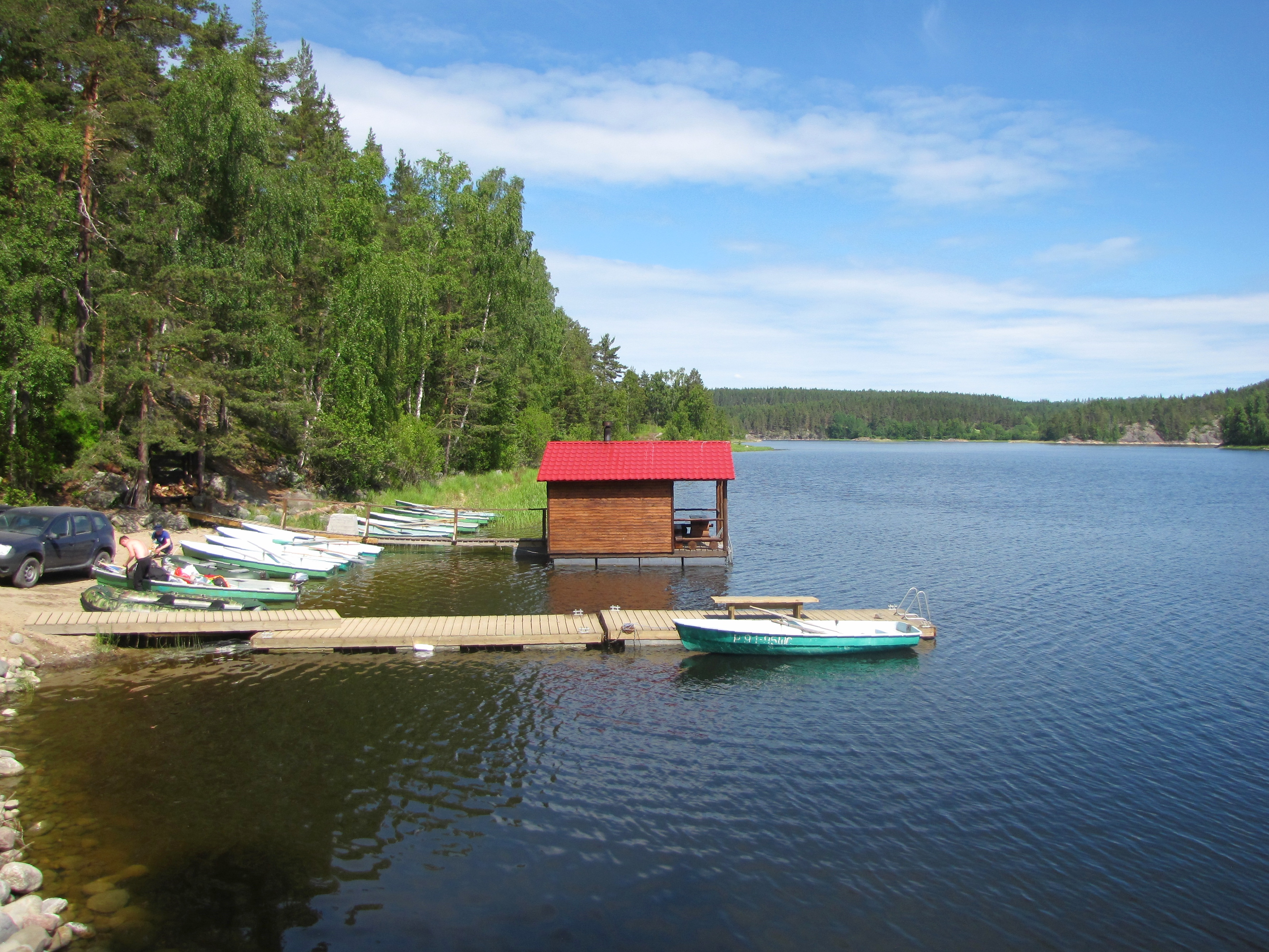 База отдыха "Лумиваара". Причал